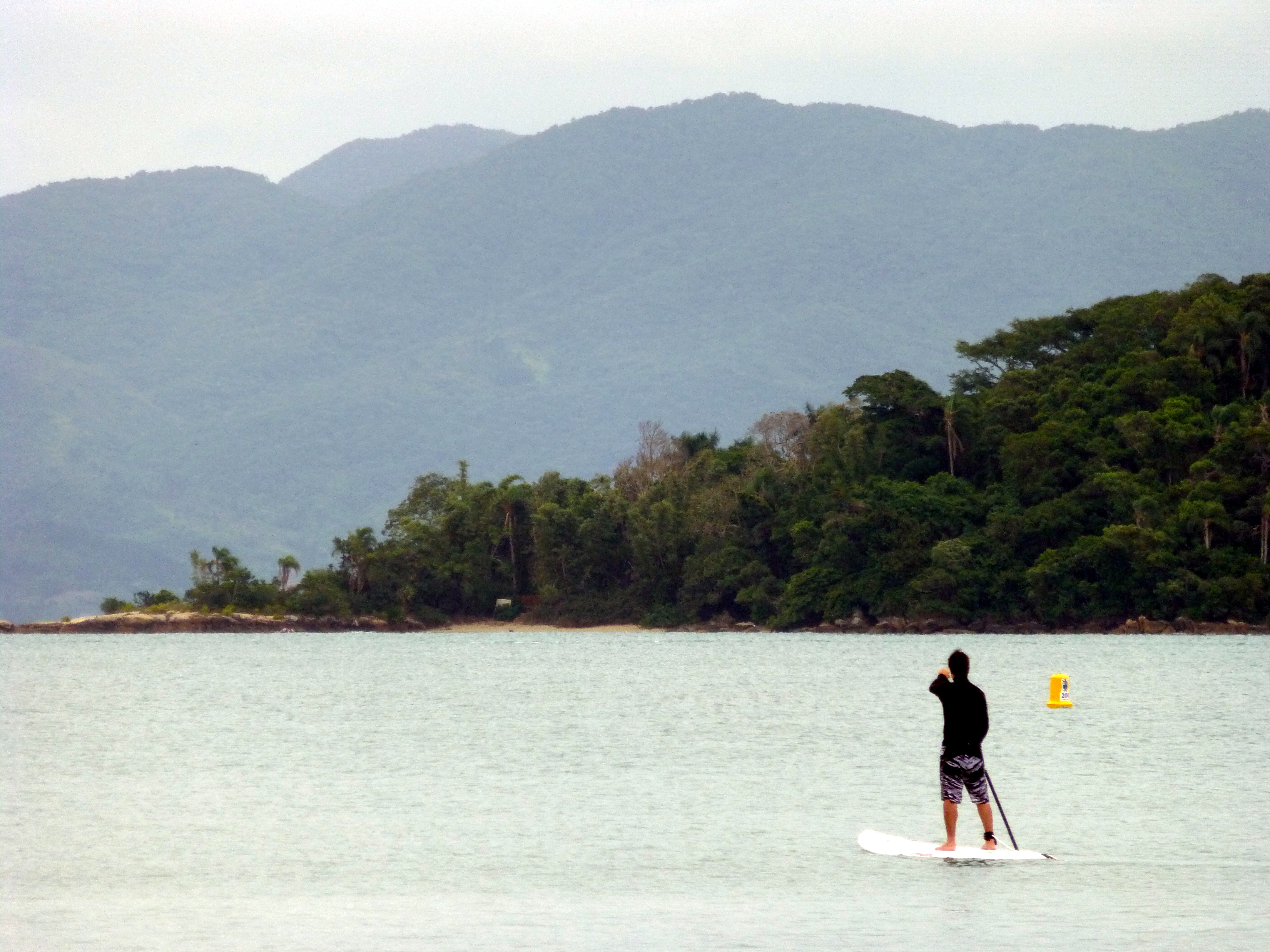 Vista parcial de la Isla del Francés, ubicada frente a las costas de Canasvieiras, al norte de la isla de Santa Catarina, en el municipio de Florianópolis.